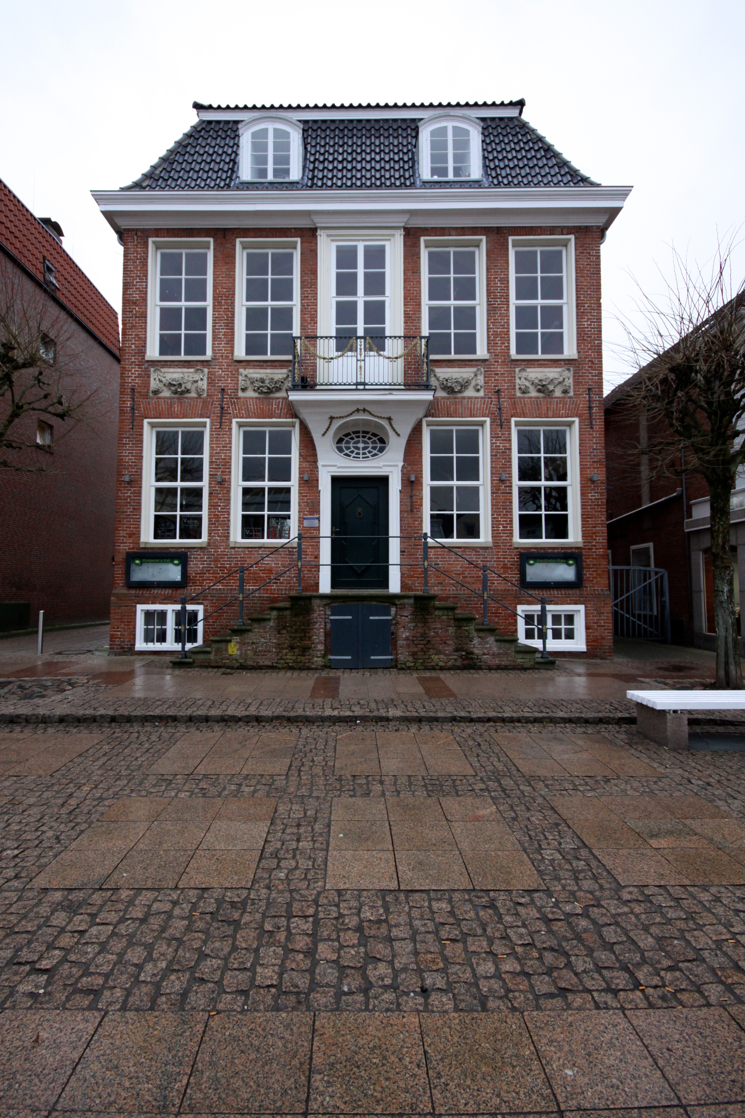 Knodtsches Haus, ein 1735 vom fürstlichen Hofbaumeister Heinrich Horst Bürgerhaus im niederländischen Spätbarockstil.